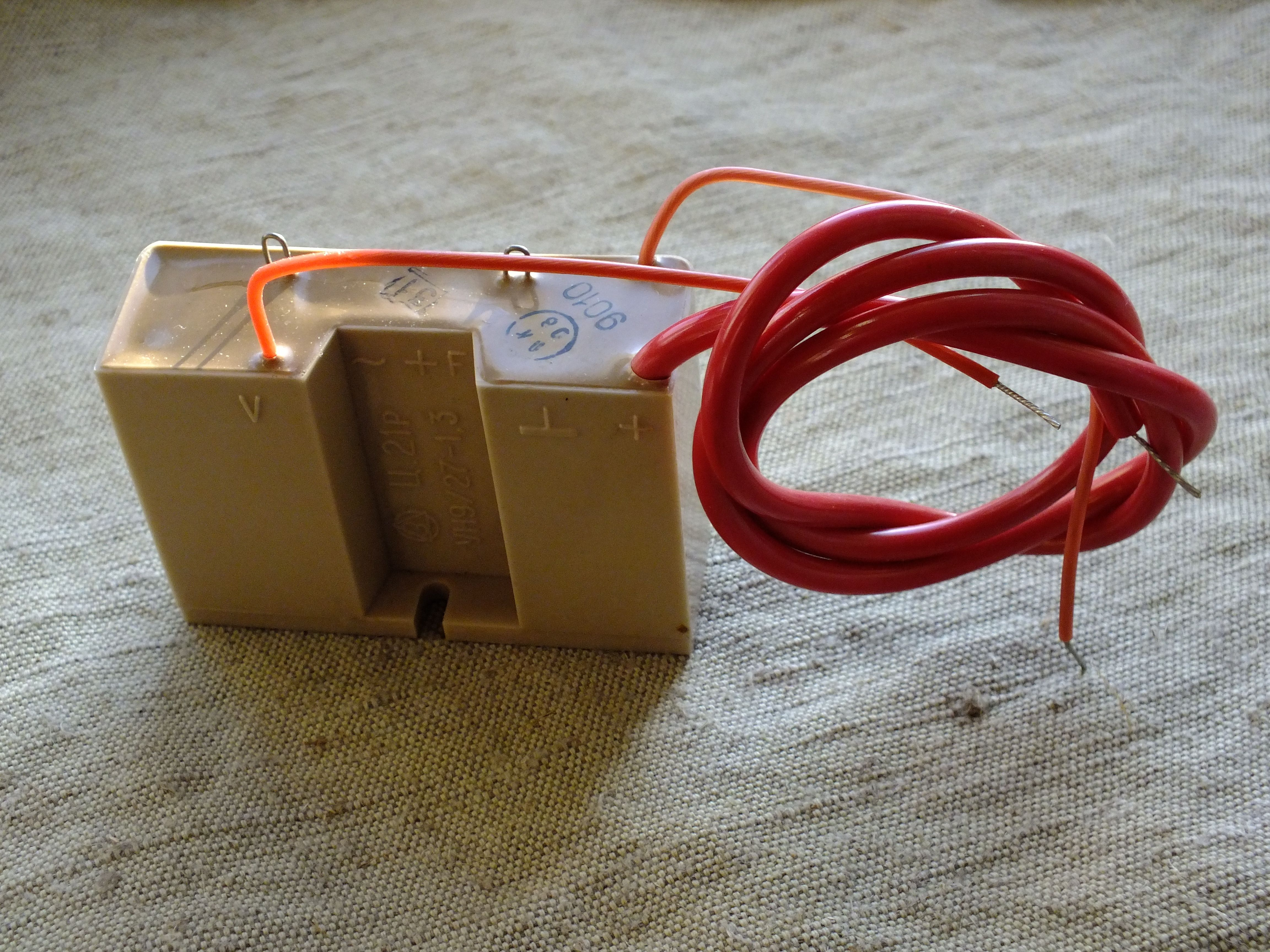 Умножитель напряжения УН9-27 1,3